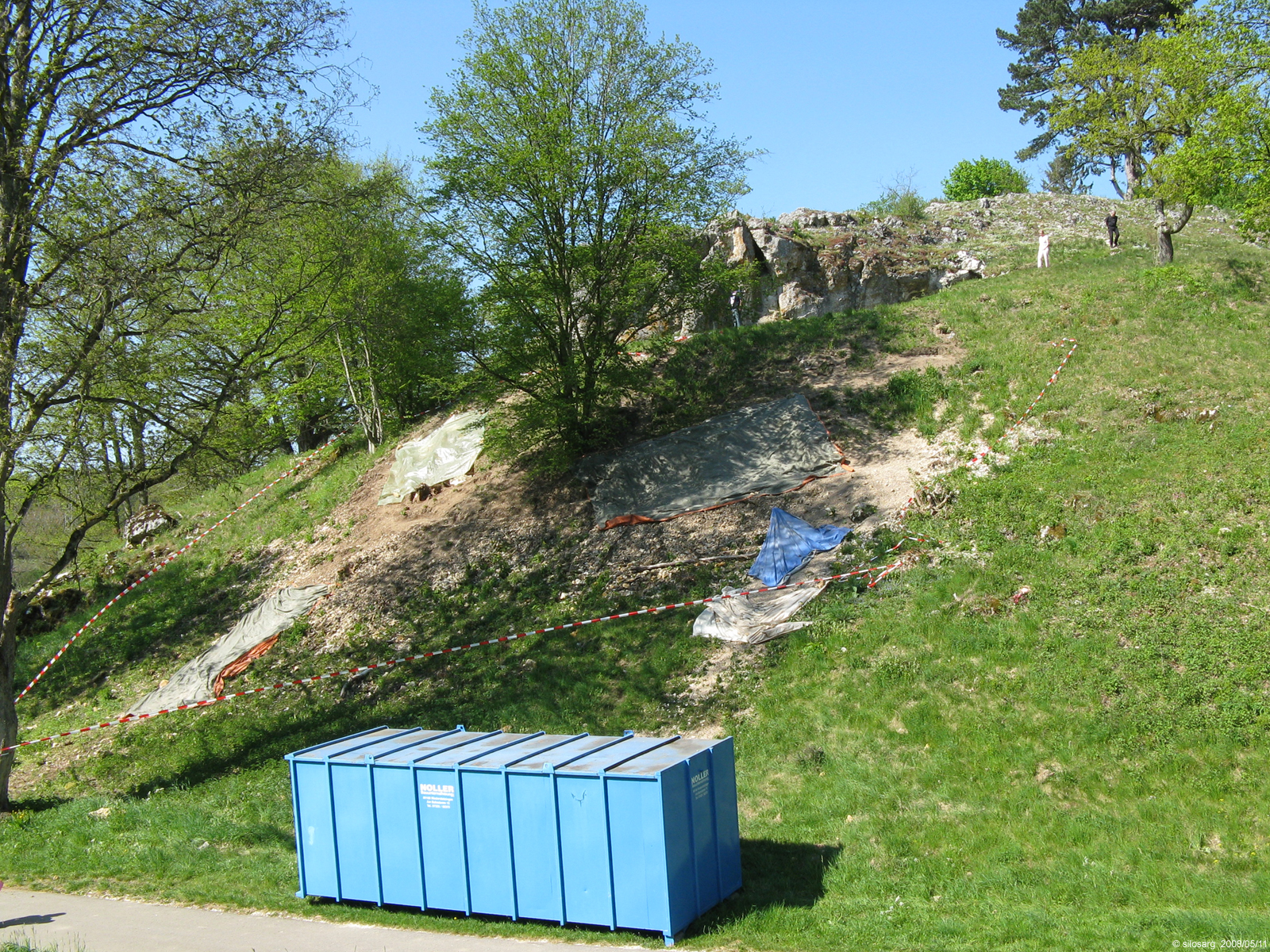 Nachgrabungen im Aushub der Vogelherdhoehle in 2008 unter der Leitung von Professor Nicholas Conard, Tübingen.